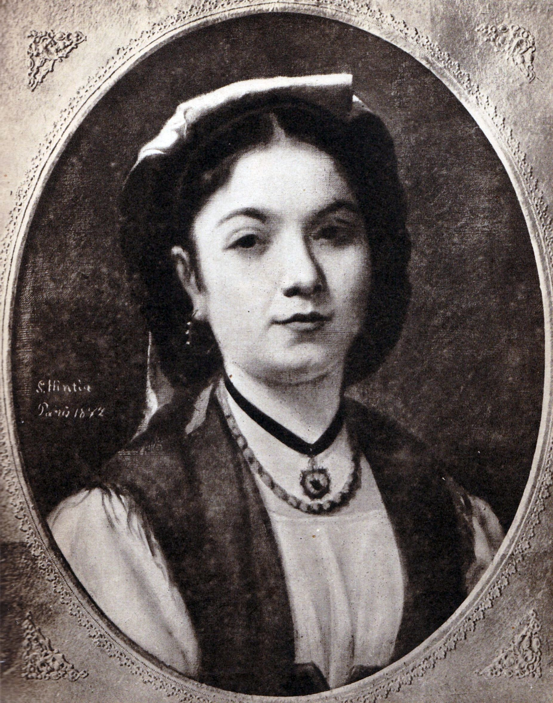 Italianca